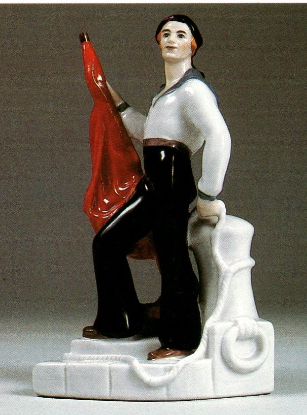 Porzellanskulptur Fahnenträger von Natalja Danko